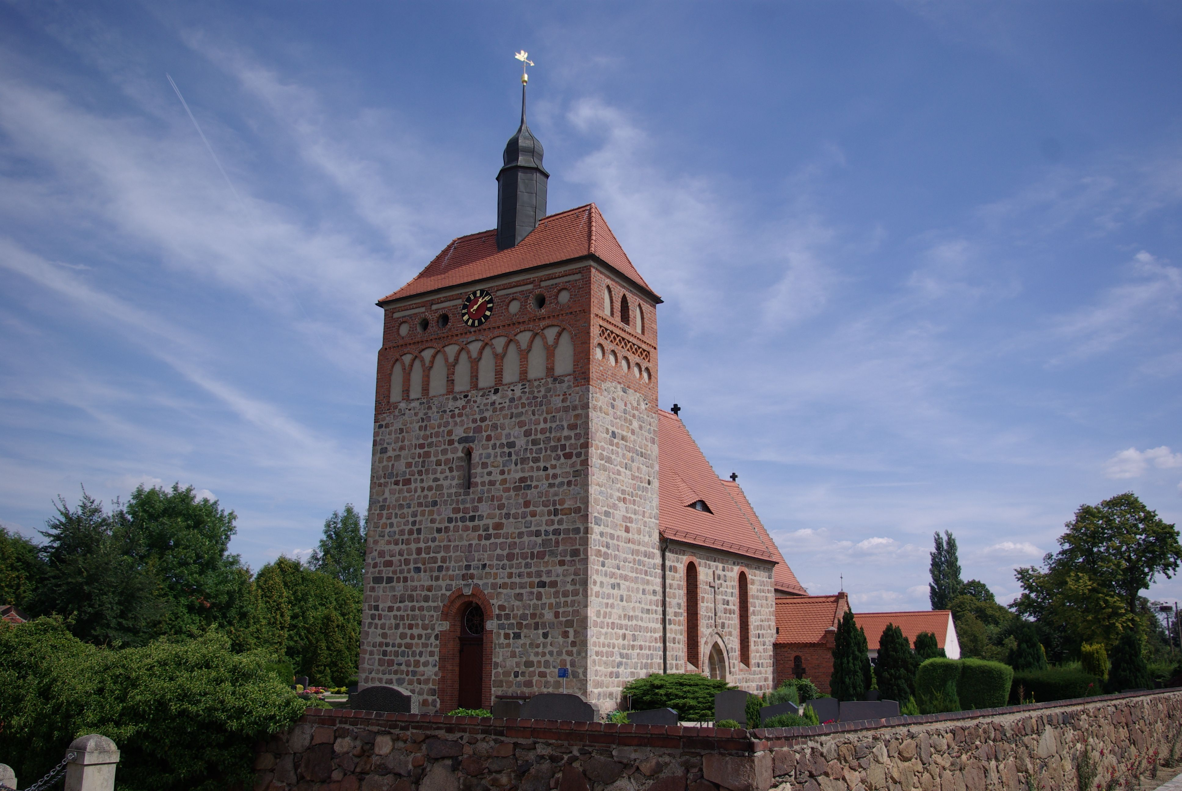 Doberlug-Kirchhain in Brandenburg, Ortsteil Frankena. Die Kirche steht unter Denkmalschutz.